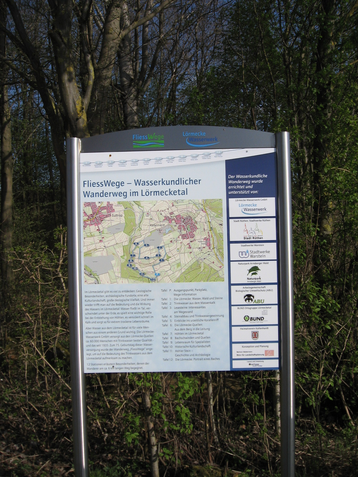 Schild „FliessWege - Wasserkundlicher Wanderweg im Lörmecketal“ (Tal der Lörmecke) bei Rüthen-Kallenhardt